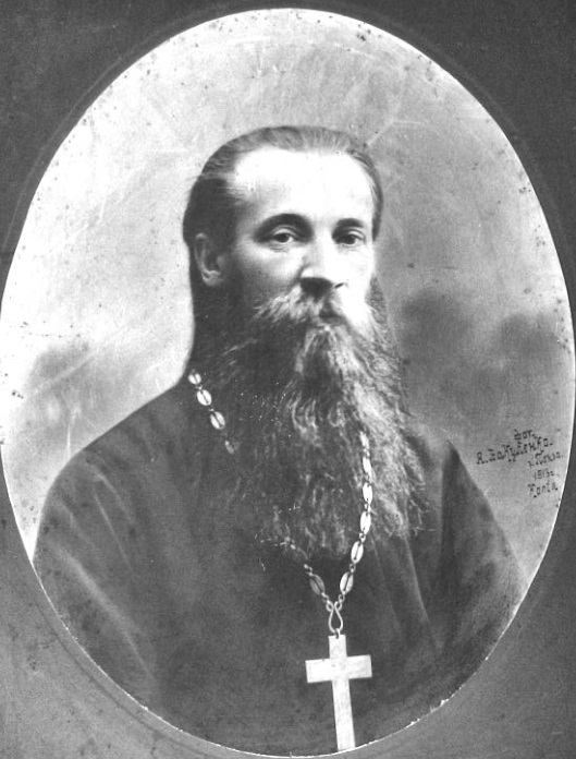 Священник Уранов Александр Сергеевич - отец Алексея Уранова